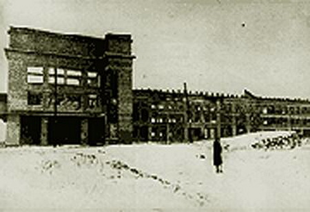 Разрушенный 3-й корпус индустриального института